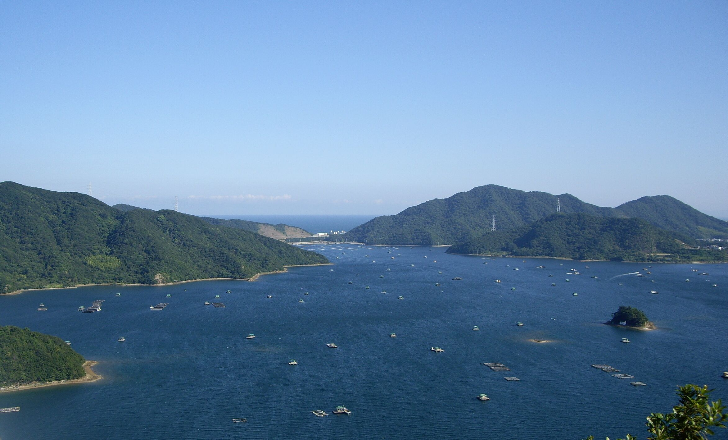 ウチノ海(徳島県鳴門市) - 四方見展望台より撮影。